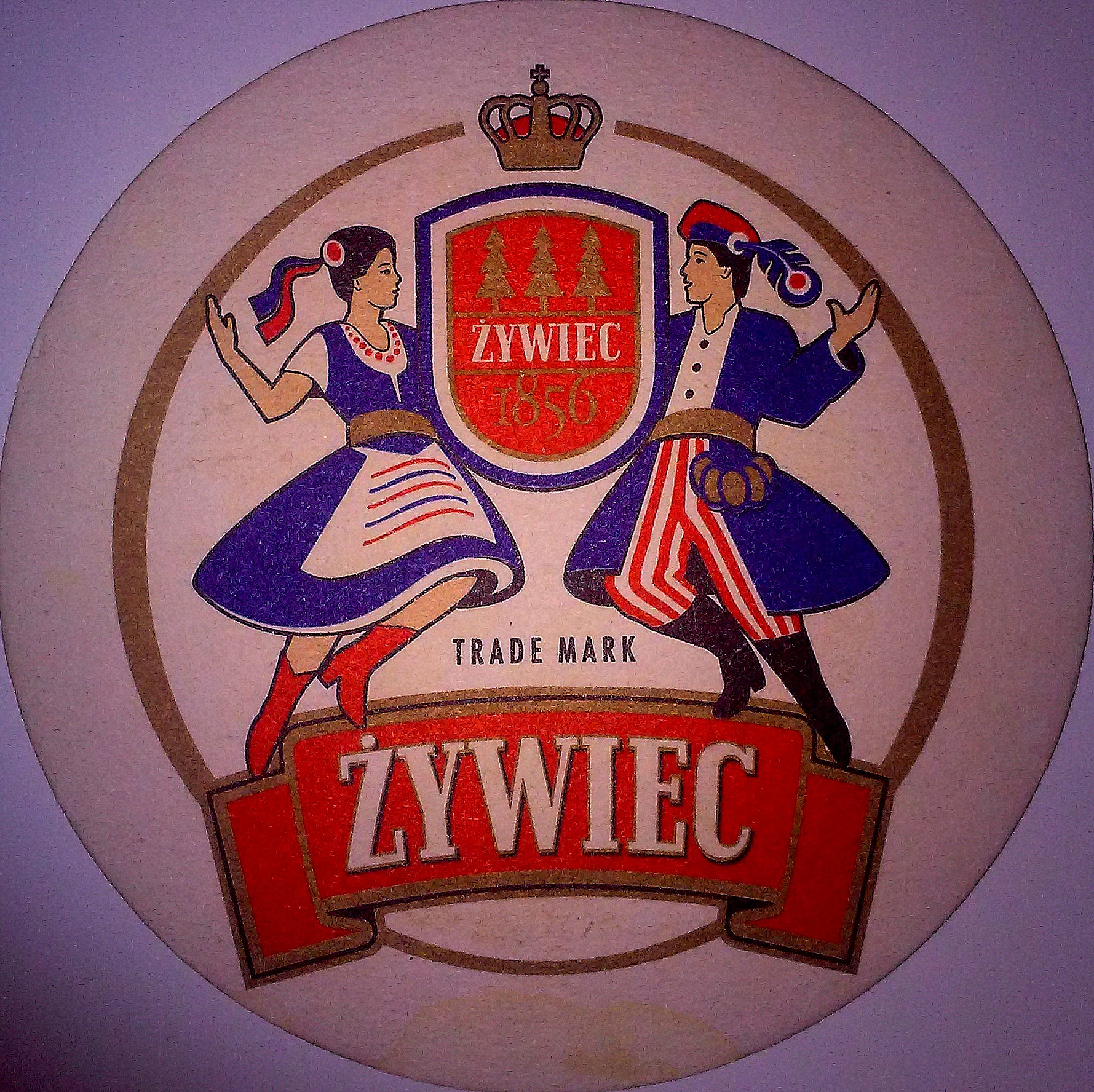 Podstawka pod piwo Żywiec